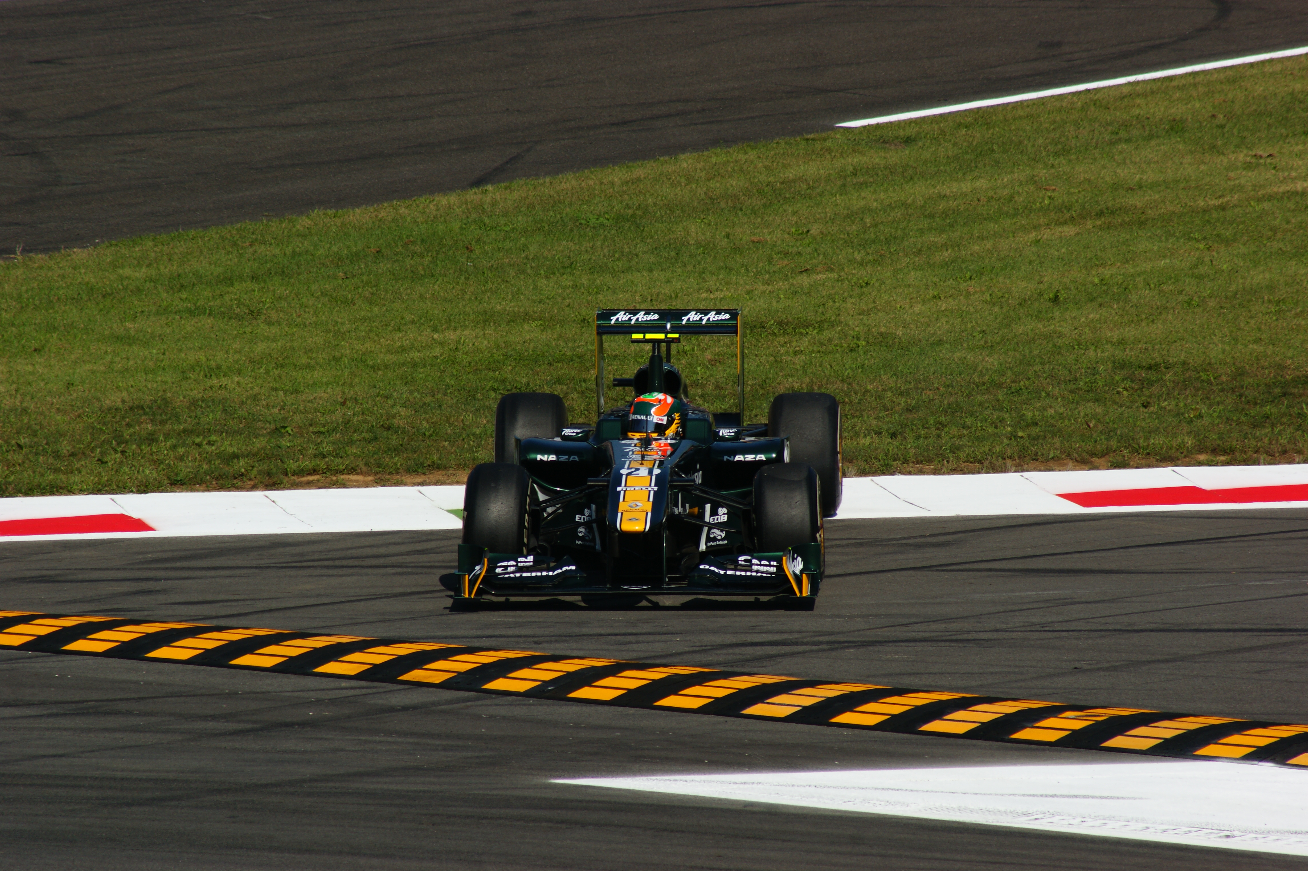 Karun Chandhok alla prima variante Monza 2011